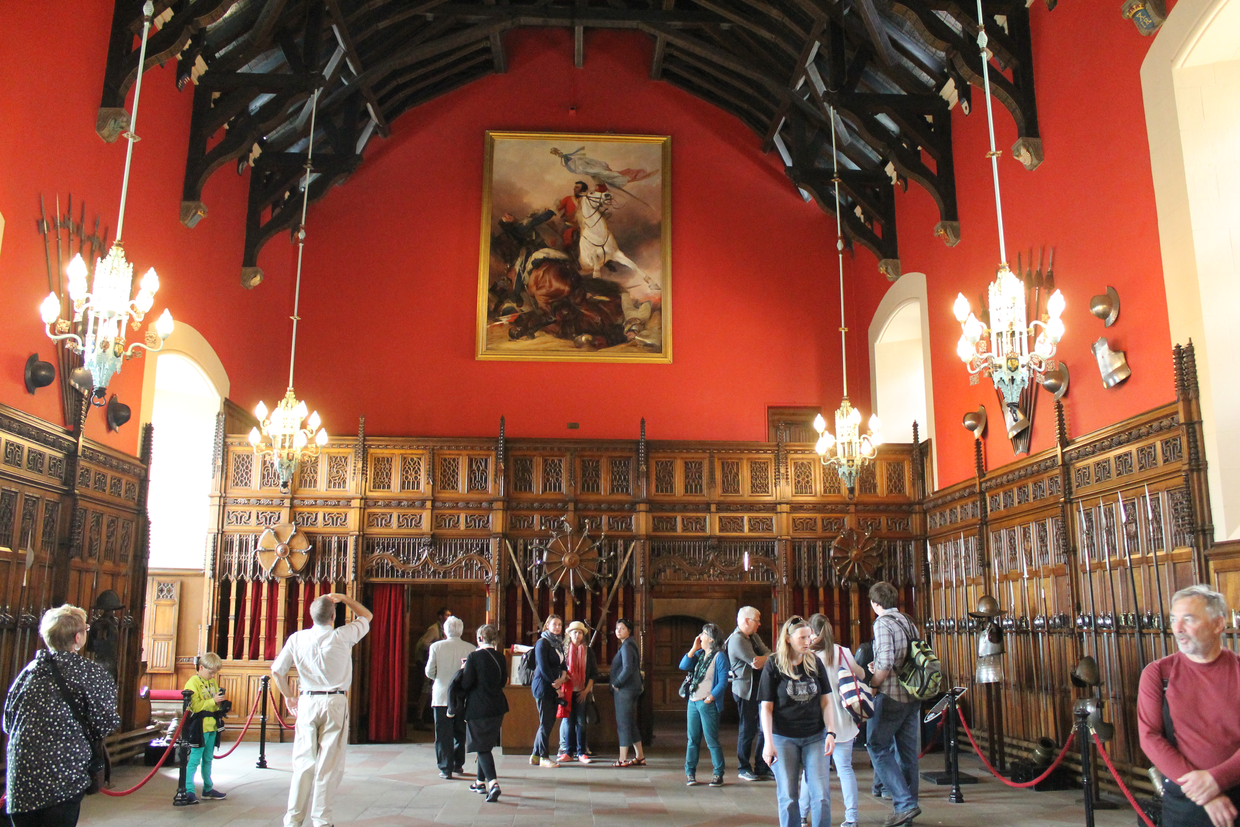 Edinburgh.